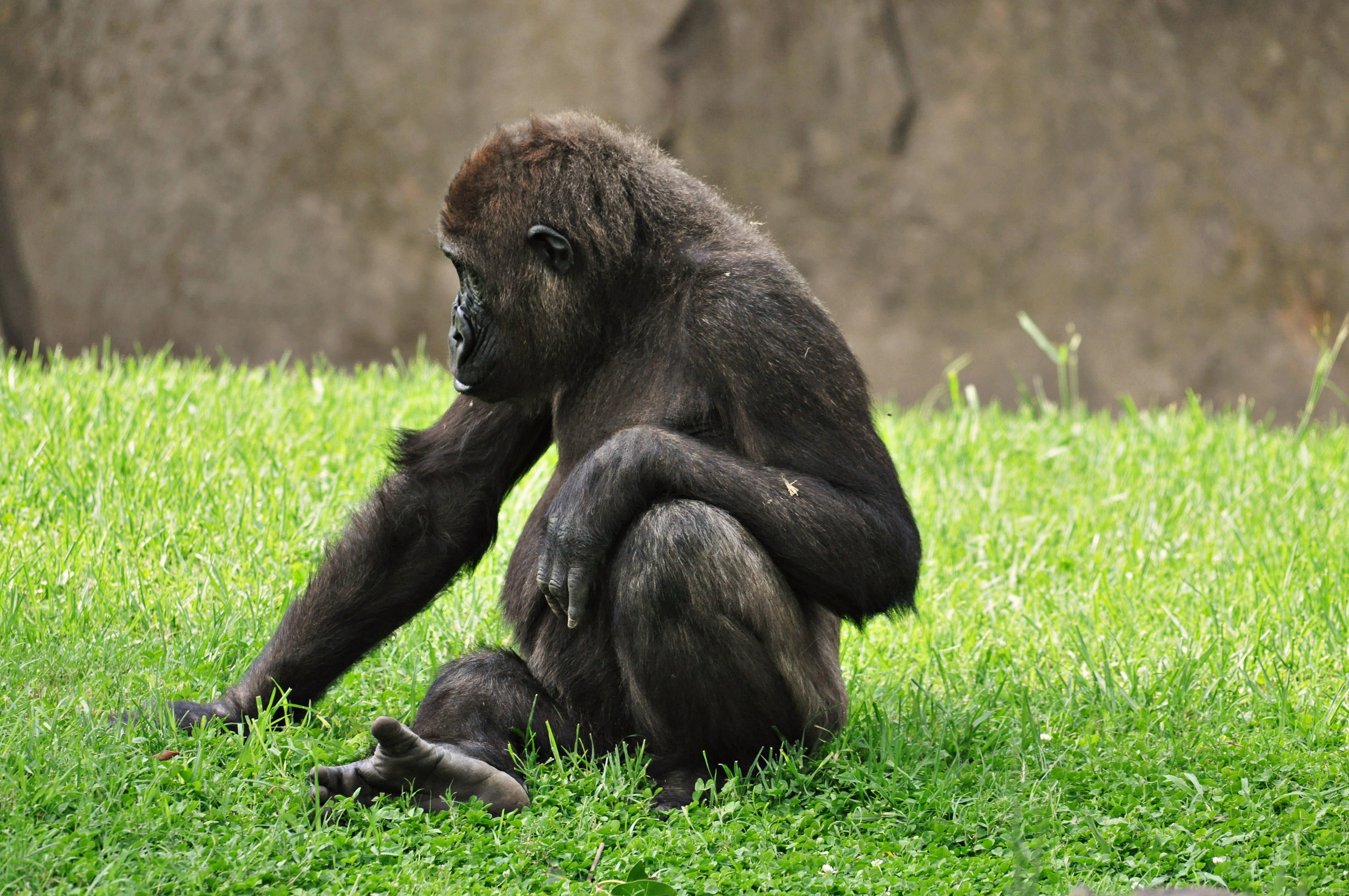 Gorilla gorilla